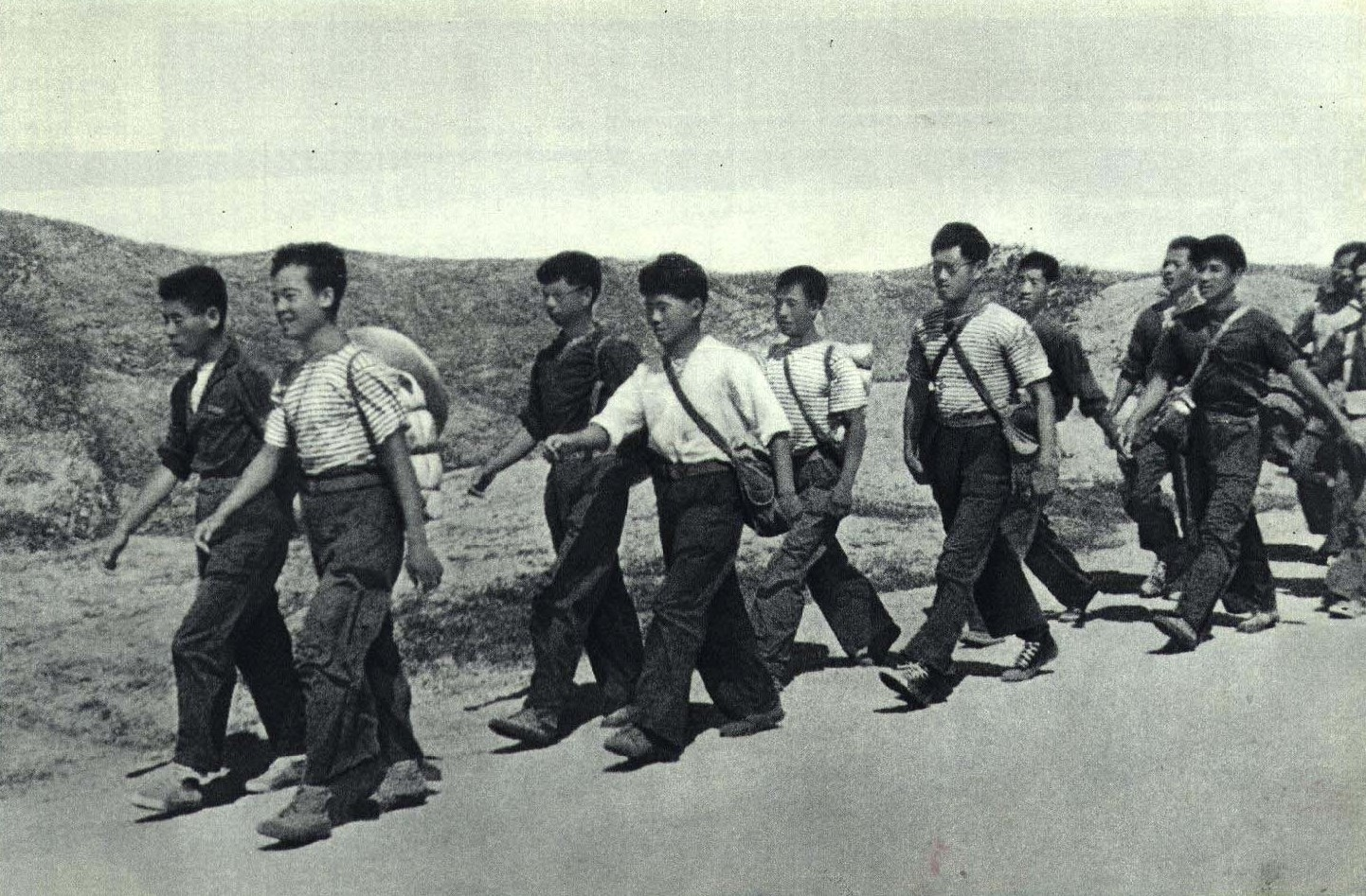 1967-03 1967年大连海运学院红卫兵 长征红卫兵